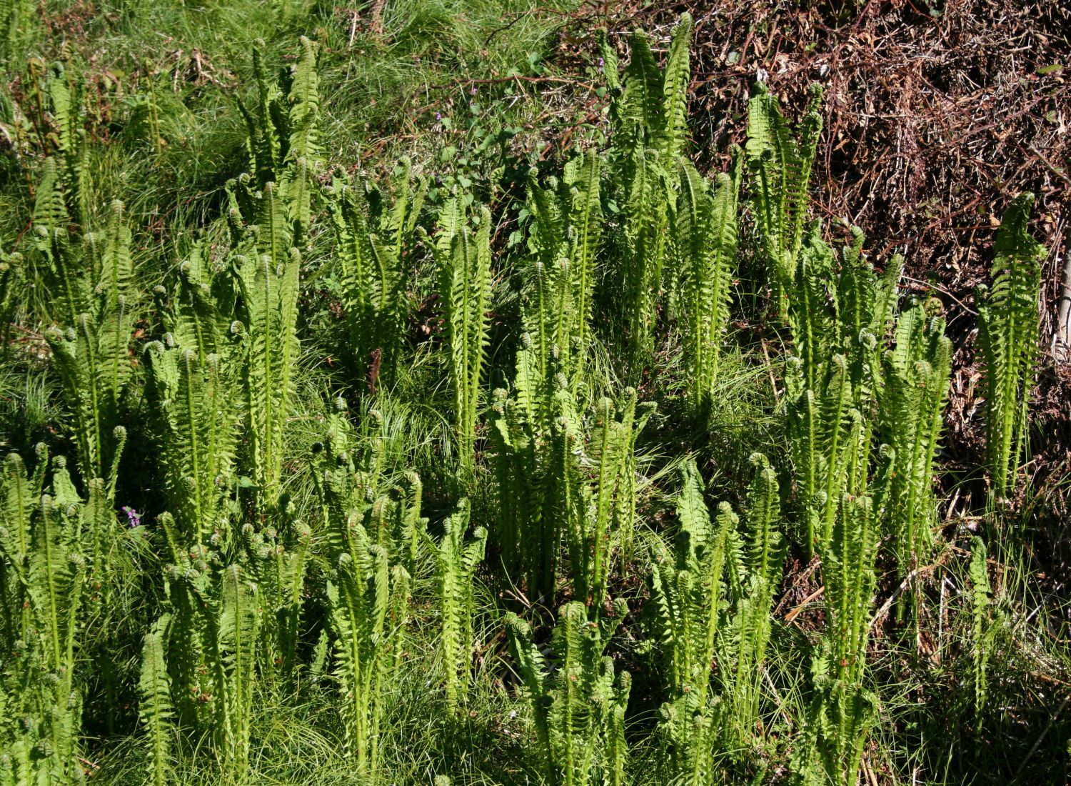 Straußenfarn (Matteuccia struthiopteris), Onocleaceae – Österreich/Austria/Autriche: Tirol, Kitzbüheler Alpen, Jochbergwald ca. 2,5 km N Pass Thurn, ca. 1060 m